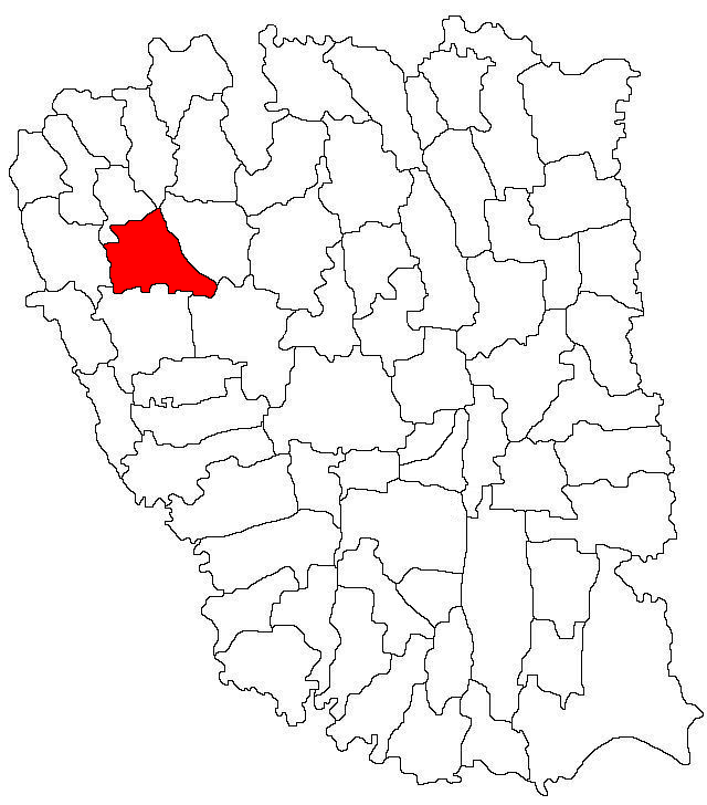 Categorie:Hărţi ale judeţului Galaţi